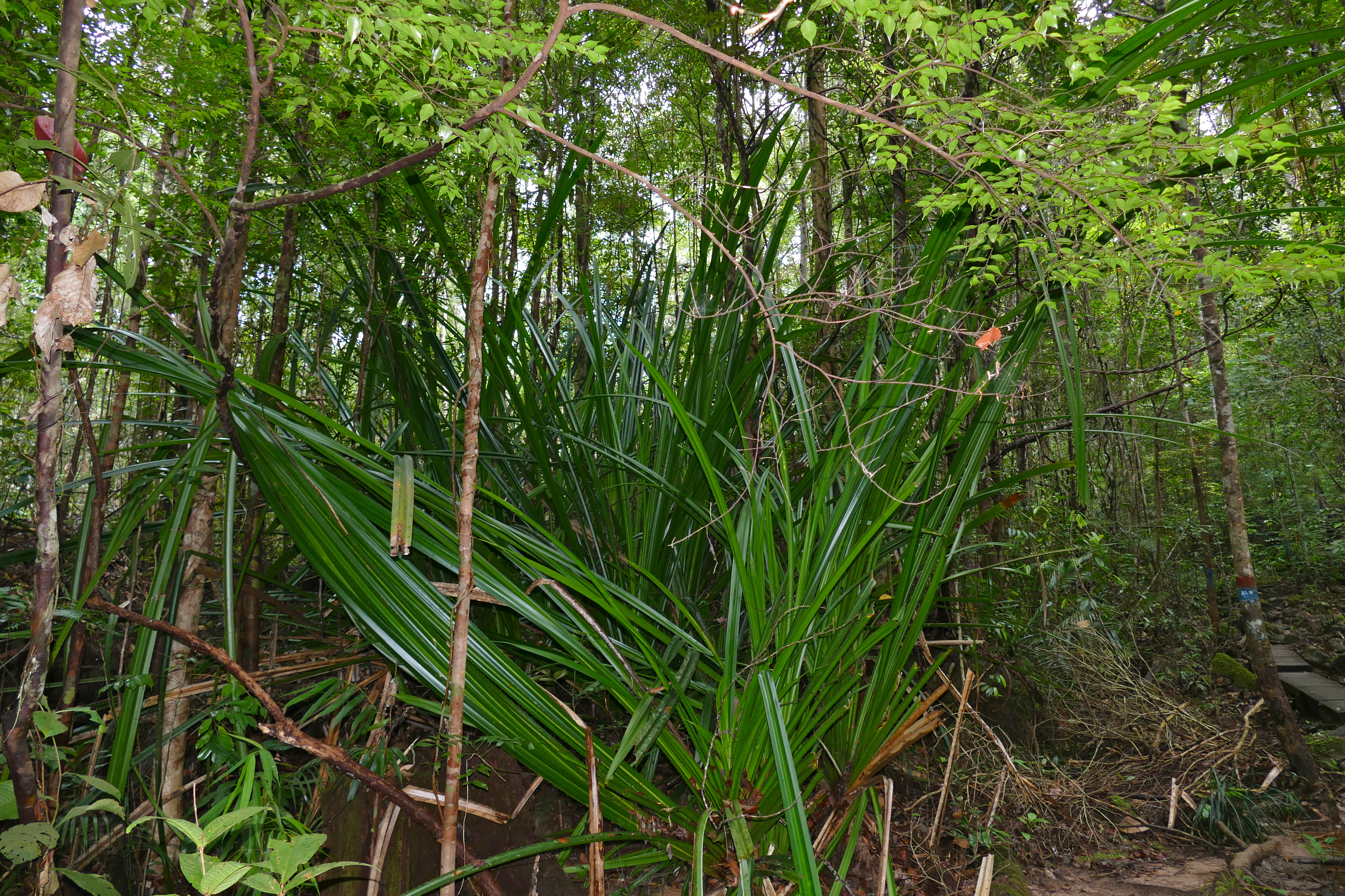 Gunung Santubong NP, North of Kuching, Sarawak, MALAYSIA